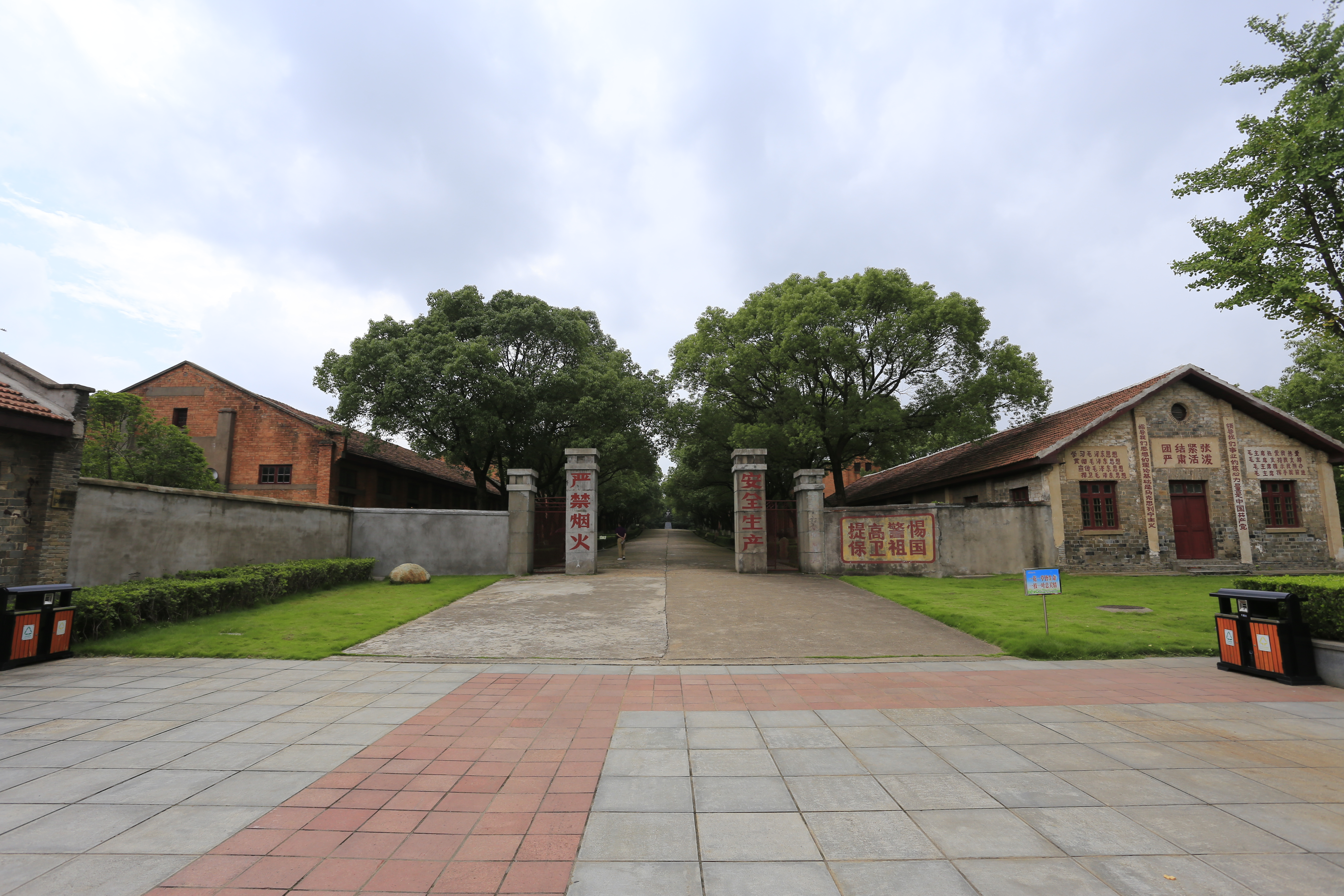 邓小平劳动车间